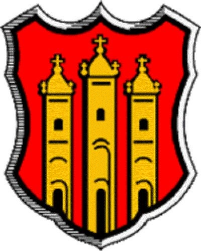 Das Wappen von Neckenmarkt, das bei der Markterhebung im Jahre 1578 verliehen worden ist, zeigt drei Türme auf rotem Feld.